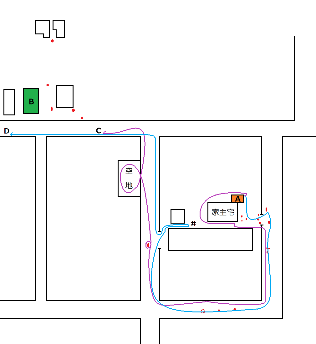 吉岡述直 『刑事証拠上における血液型の価値―弘前大学医学部教授夫人殺し事件』 法務研修所〈検察研究叢書 9〉、1952年、4頁及び渡部保夫 『刑事裁判を見る眼』 岩波書店〈岩波現代文庫〉、2002年、126頁から作成。